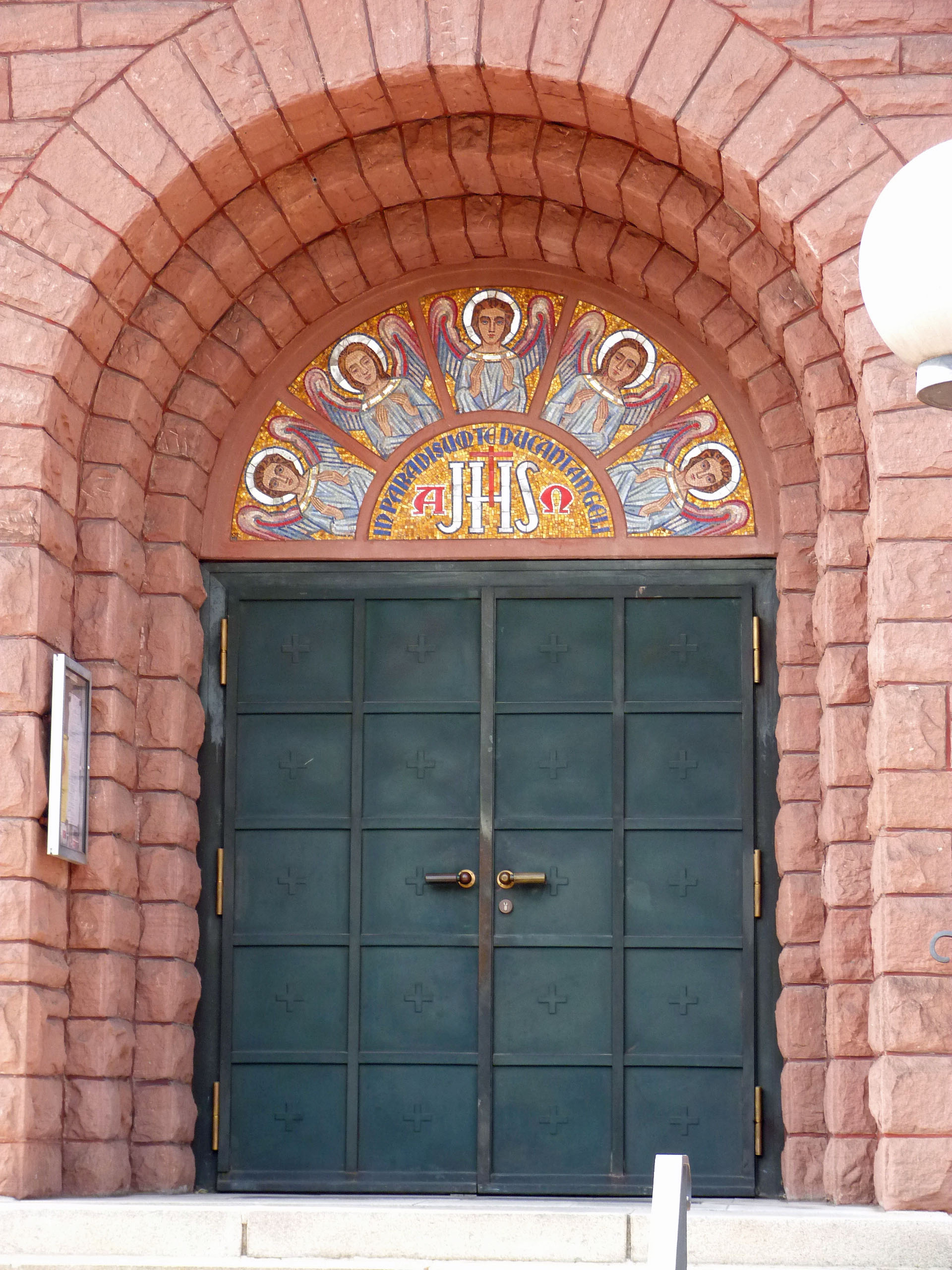 Mosaik am Seiteneingang der Christkönig-Kirche in Hauenstein, fotografiert am 03.08.2013. Es zeigt fünf Engel als Erinnerung an fünf Männer, die beim Bruch der Steine für die Kirche bei einem Sprengunglück ums Leben gekommen sind.